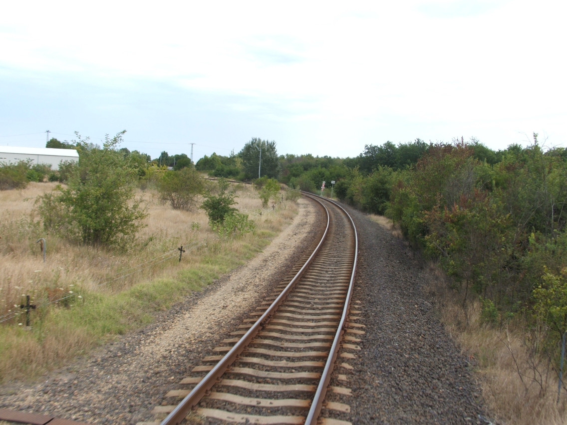 A 147-es számú vasútvonal kiágazása Orosháza felé Szentesnél.